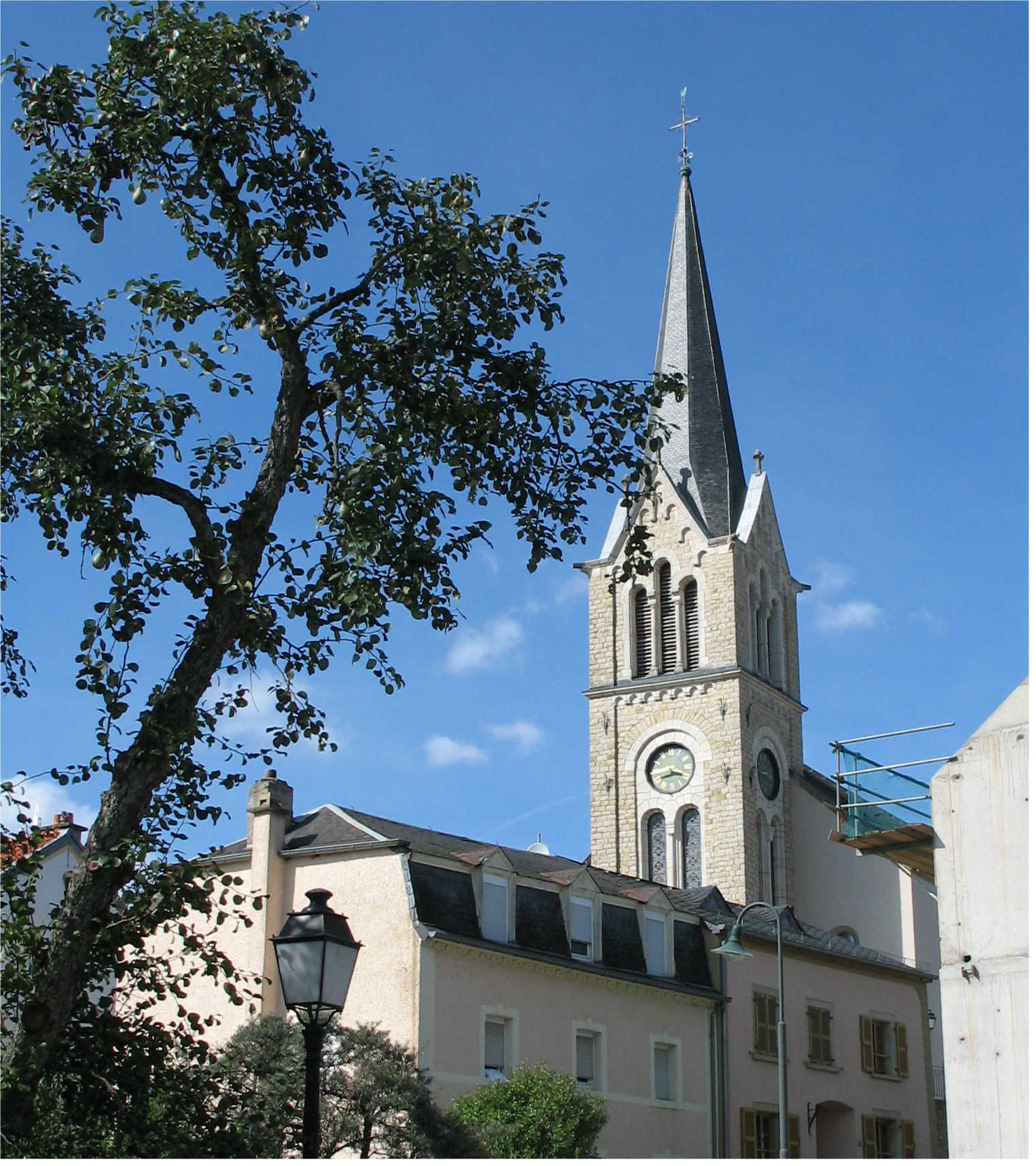 Kierch vu Menster.